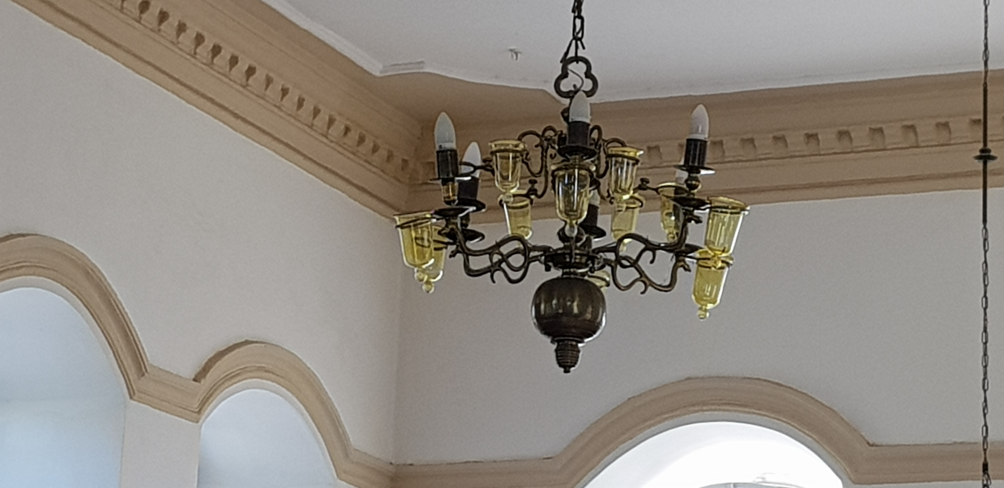 אהיל עתיק עם הדלקה בשמן